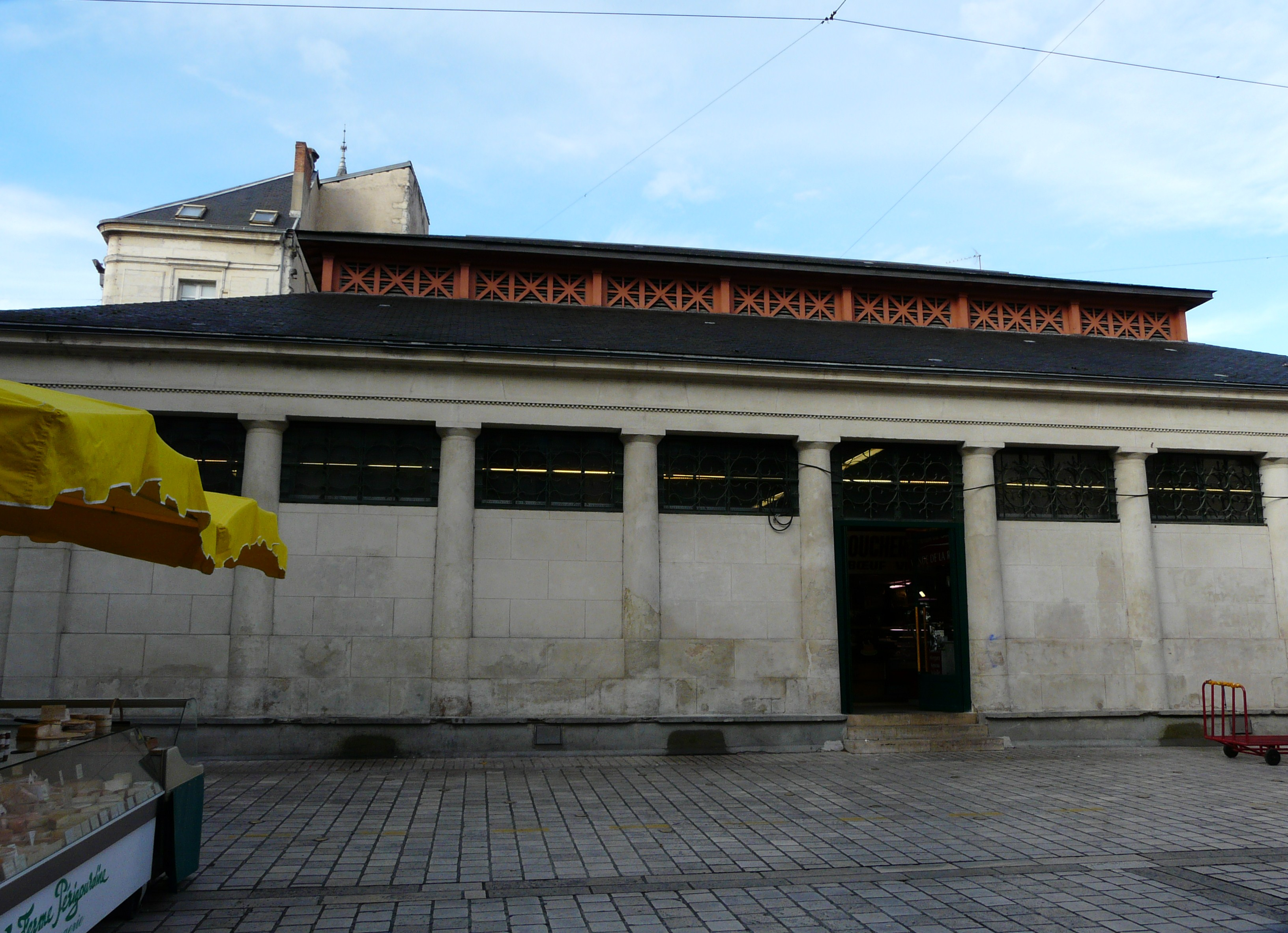 La halle sur la place du Coderc, Périgueux, Dordogne, France.